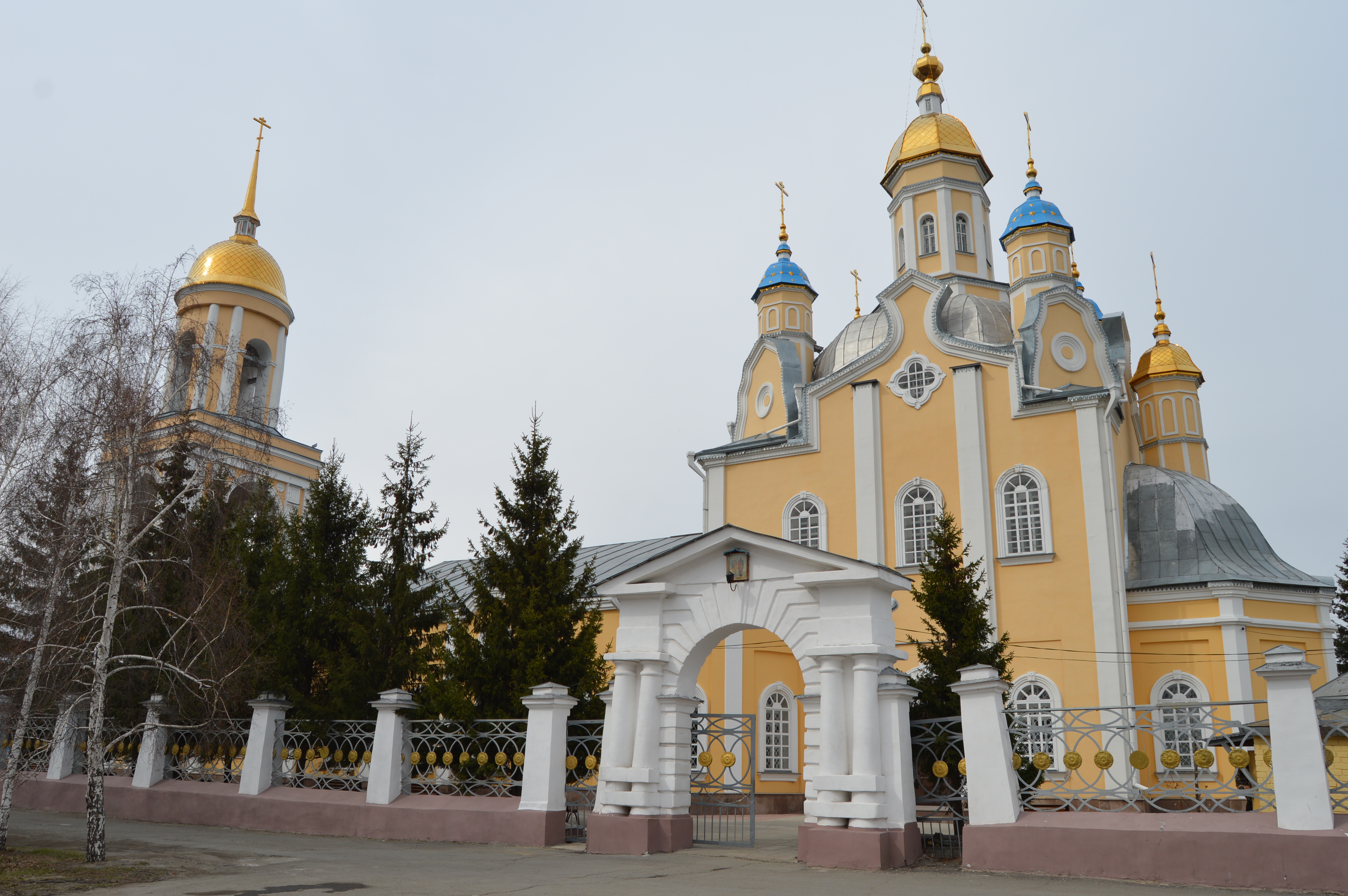 Петропавловский собор в Петропавловске (Казахстан).Район Подгора.